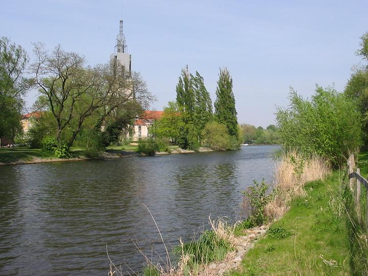 Havel bei Potsdam, An der Freundschaftsinsel, "Neue Fahrt"